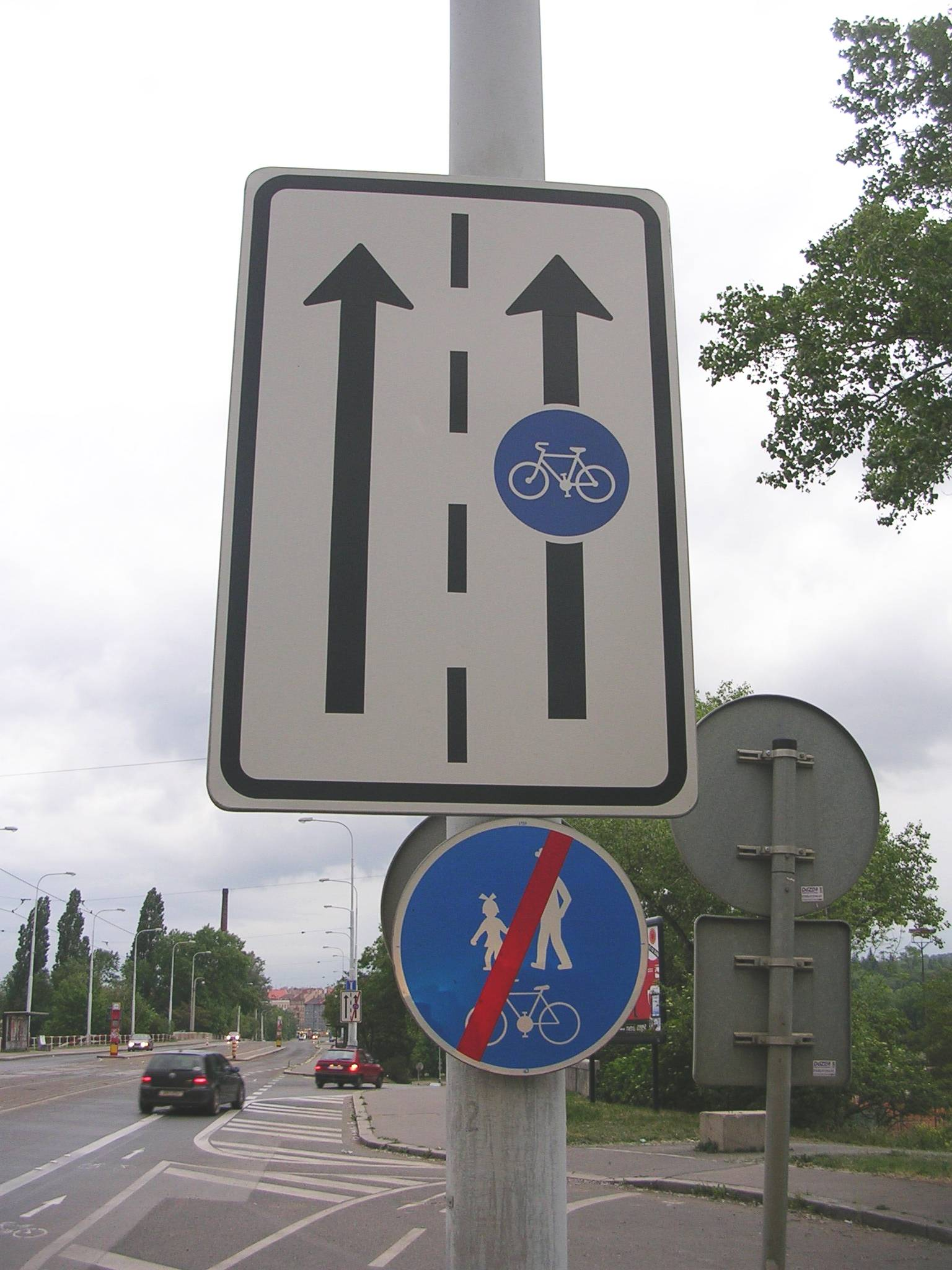 České dopravní značky IP 20a „Vyhrazený jízdní pruh“ (v modifikaci pruhu pro cyklisty) a C 9b „Konec stezky pro chodce a cyklisty“. Praha, Libeňský most.